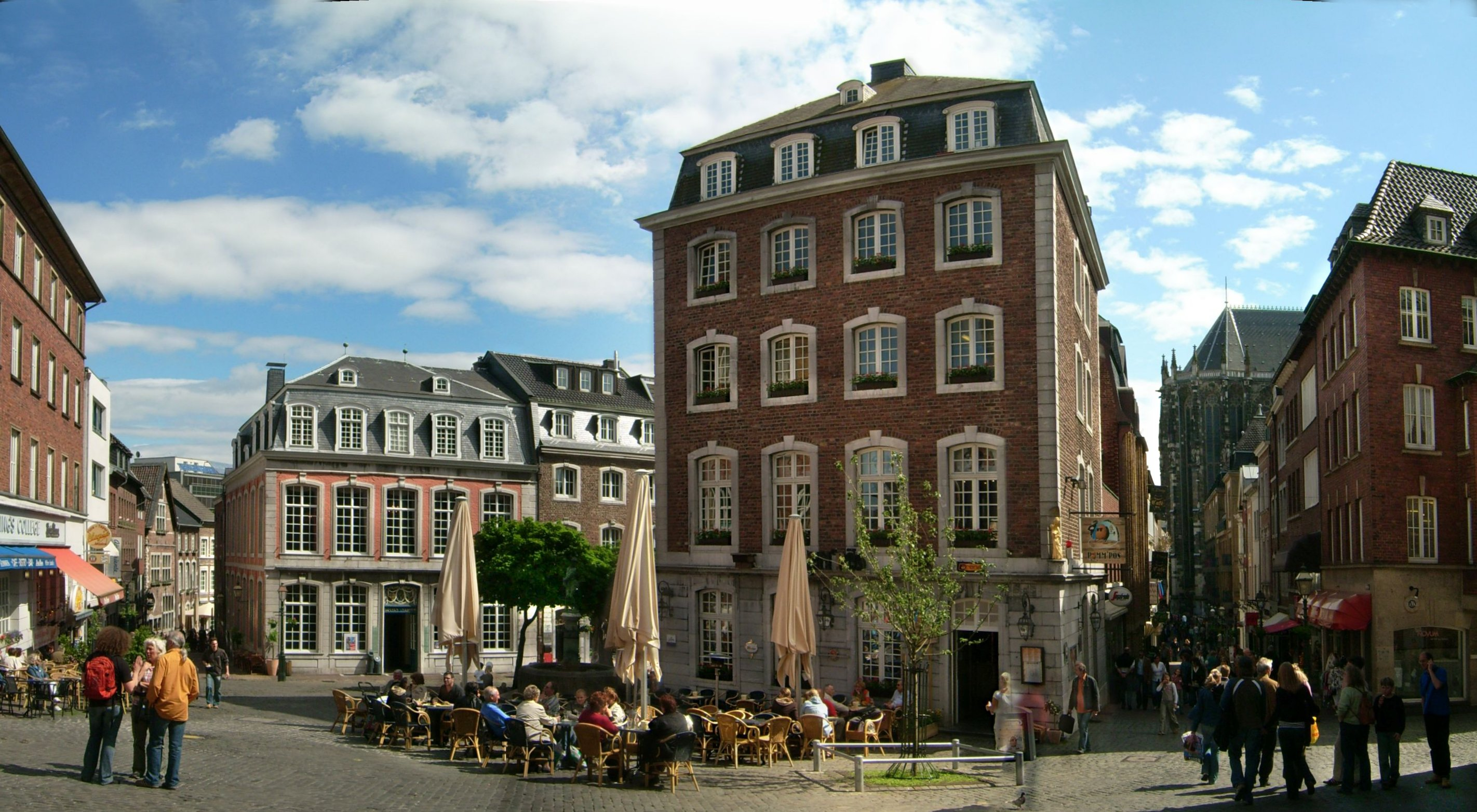 Blick auf das Couvenmuseum und den "Apfelbaum" in Aachen